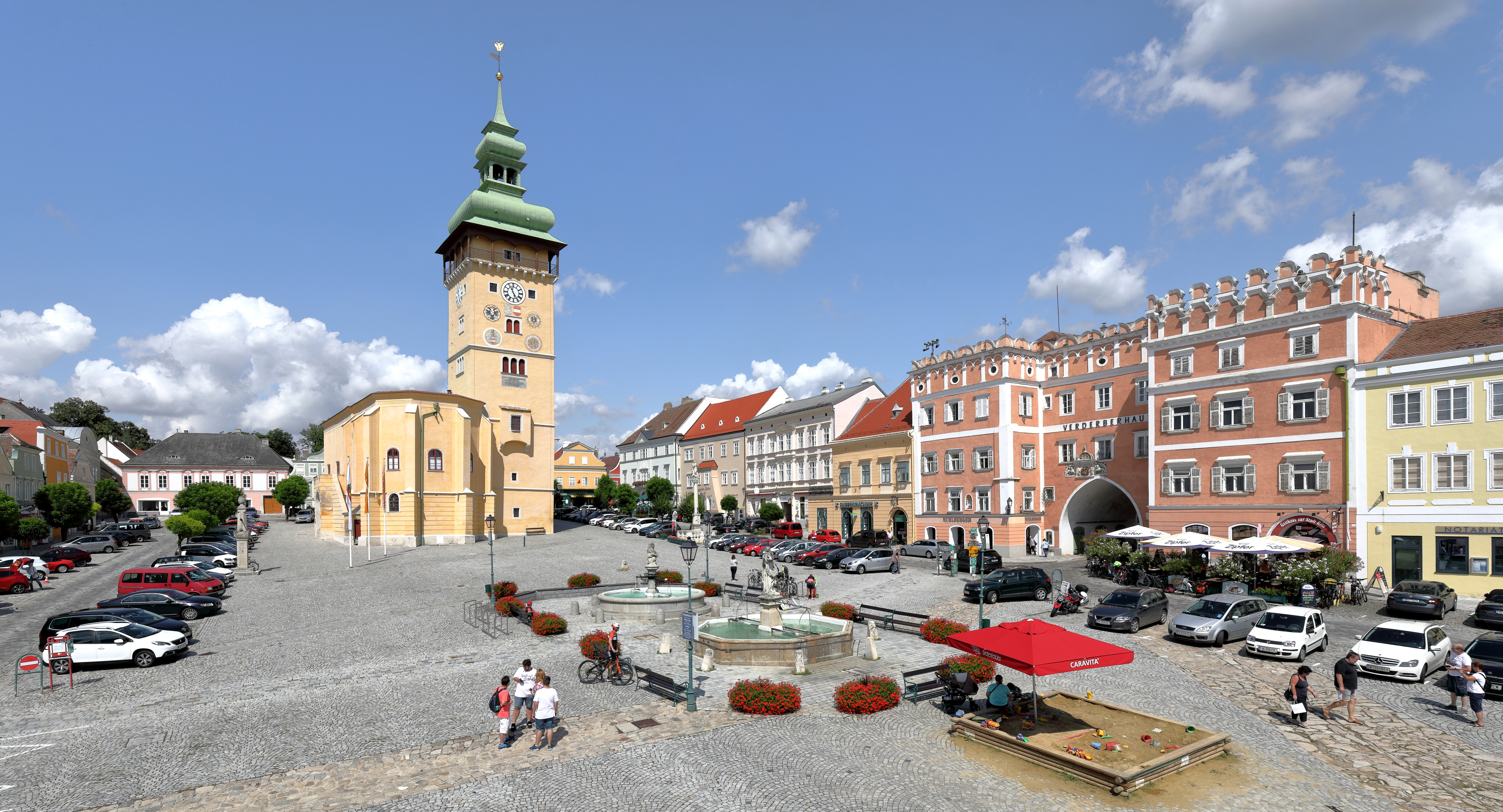 Südostansicht des Hauptplatzes der niederösterreichischen Stadtgemeinde Retz.Der große, rechteckige Platz hat eine Fläche von ca. 1,2 ha. Das ehemalige Rathaus ist der Mittelpunkt. Ursprünglich als gotische Kirche gebaut, blieb sie unvollendet und wurde Mitte des 16. Jahrhunderts zu einem Rathaus mit Rathausturm umgebaut. Weitere bedeutende Bauwerke am Hauptplatz sind das 1576 errichtete Sgraffitohaus, das Verderberhaus (erbaut 1577-1583), die 1744/45 errichtete Dreifaltigkeitssäule. Eine Pest- bzw. Mariensäule (errichtet 1680) und ein Pranger, sowie zwei Brunnen aus dem Ende des 18. Jahrhunderts. Einer mit einem Löwen, der das Stadtwappen hält und der andere mit einer Frauengestalt.